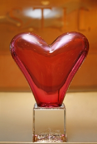 En glasstatyett som tillsammans med en check på 20.000 kr utgör Stils pris Hjärter Ess.